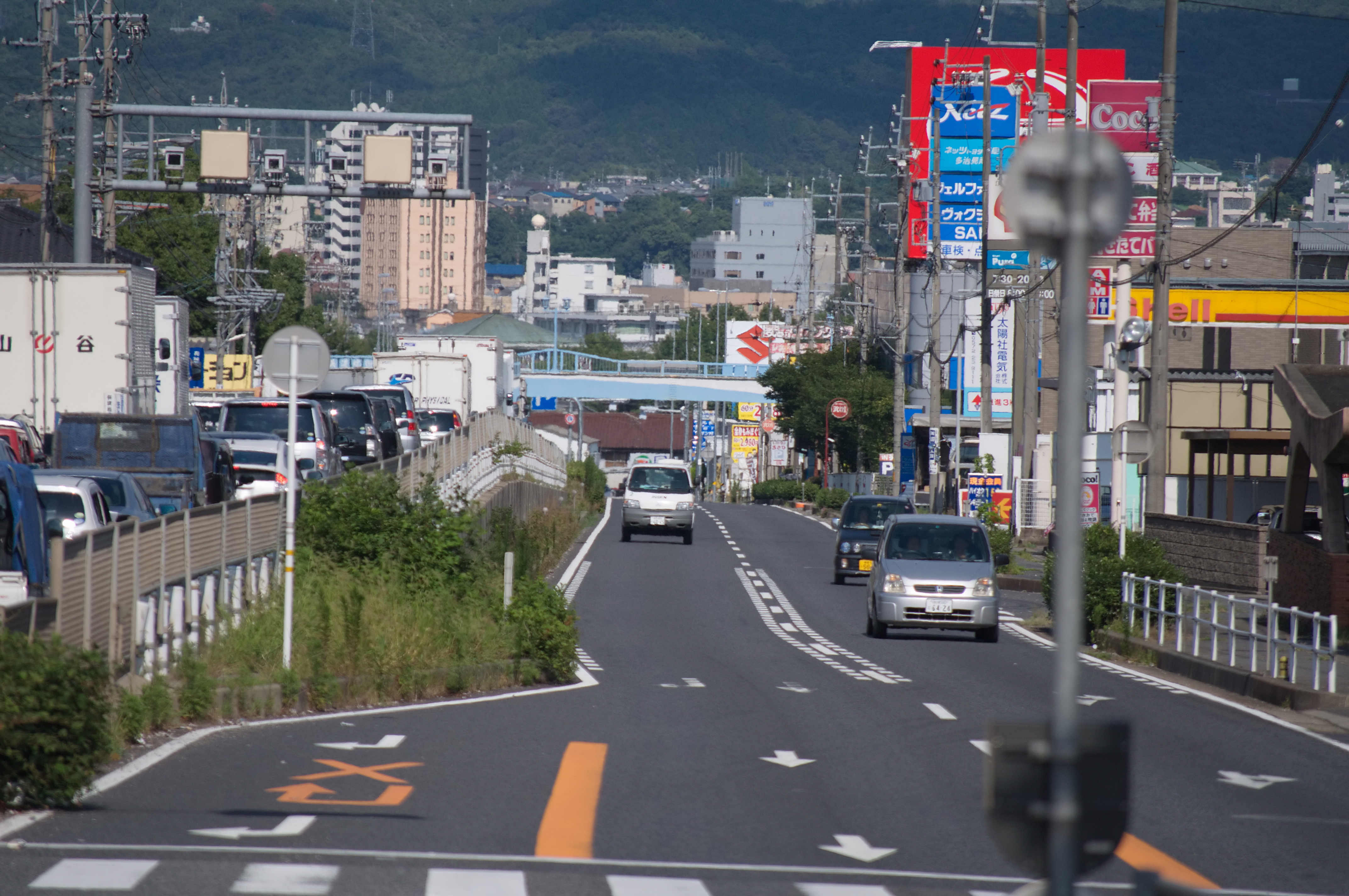 10 Chome Ikedachō, Tajimi-shi, Gifu-ken 507-0048, Japan